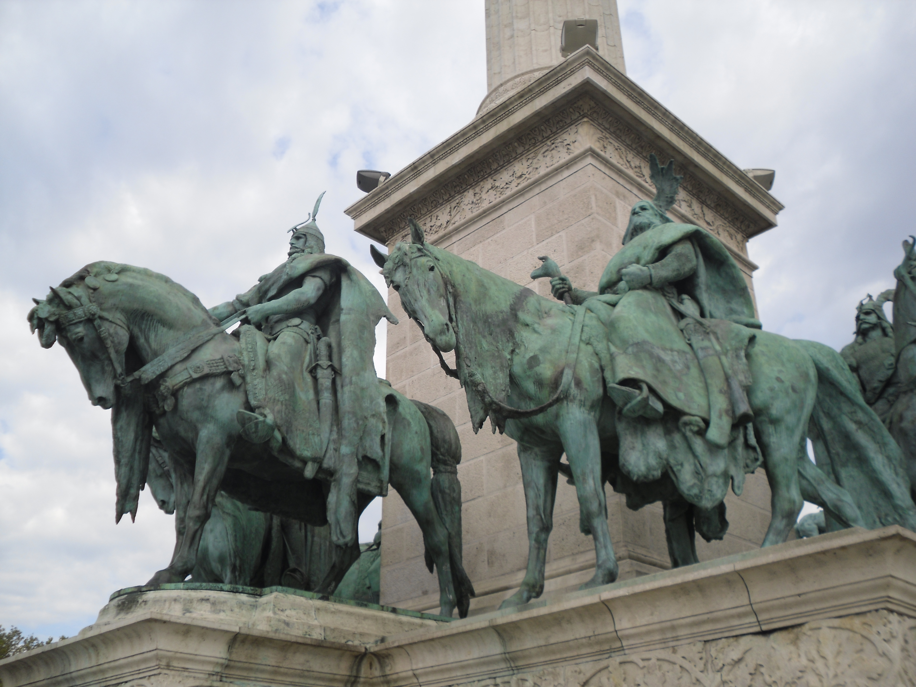 Monumento del Millenio, statua di Arpad